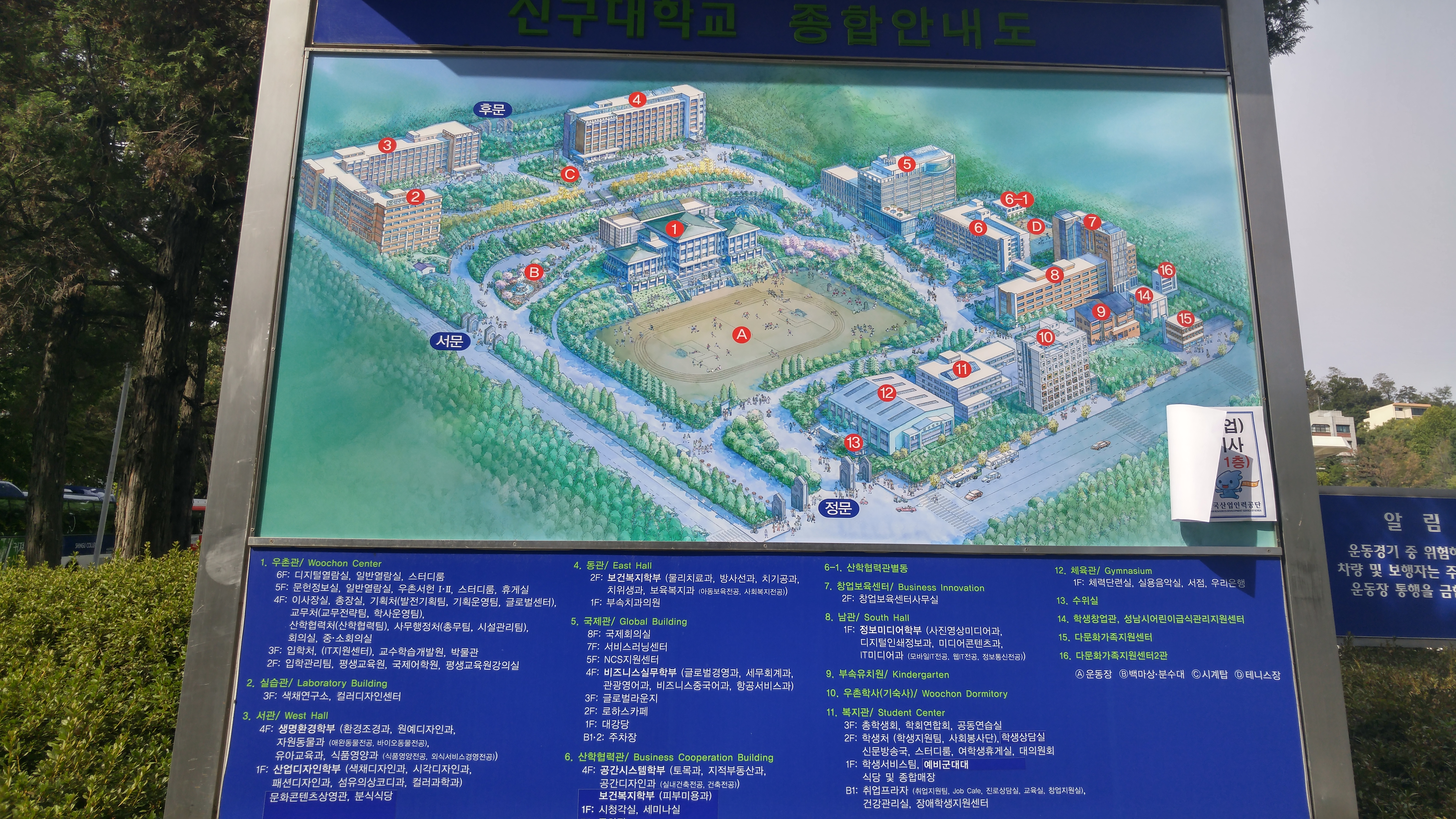 신구대학교 지도